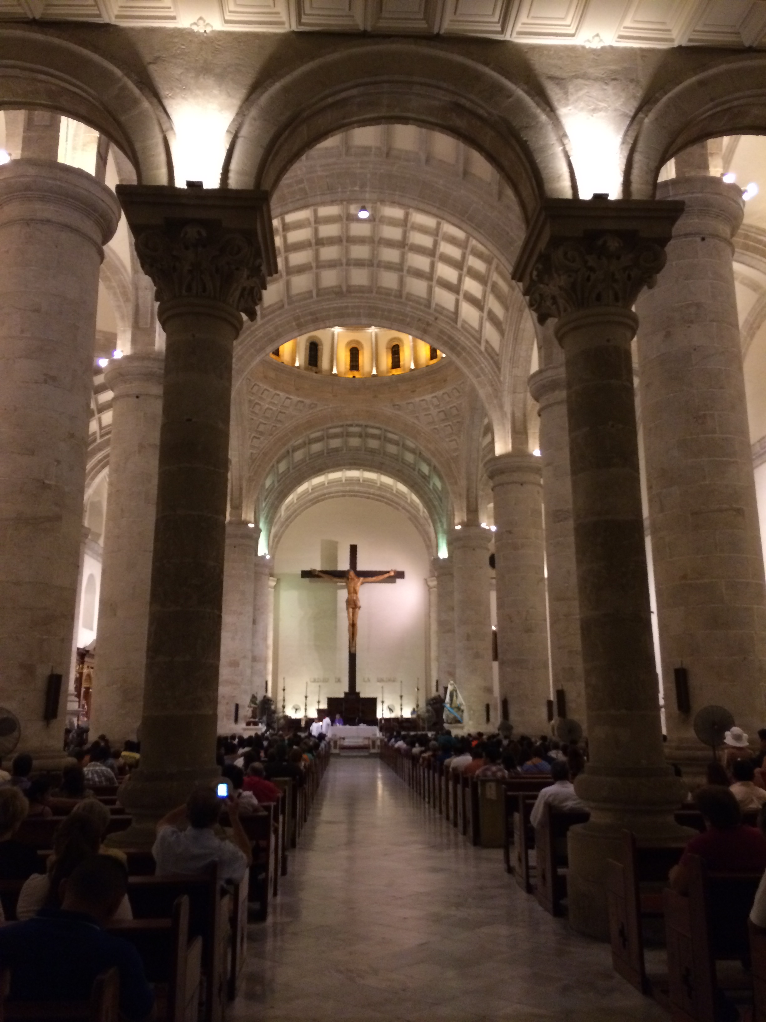 Escultura de Cristo crucificado de 7.65 metros de altura, con una cruz de 12 metros de alto.